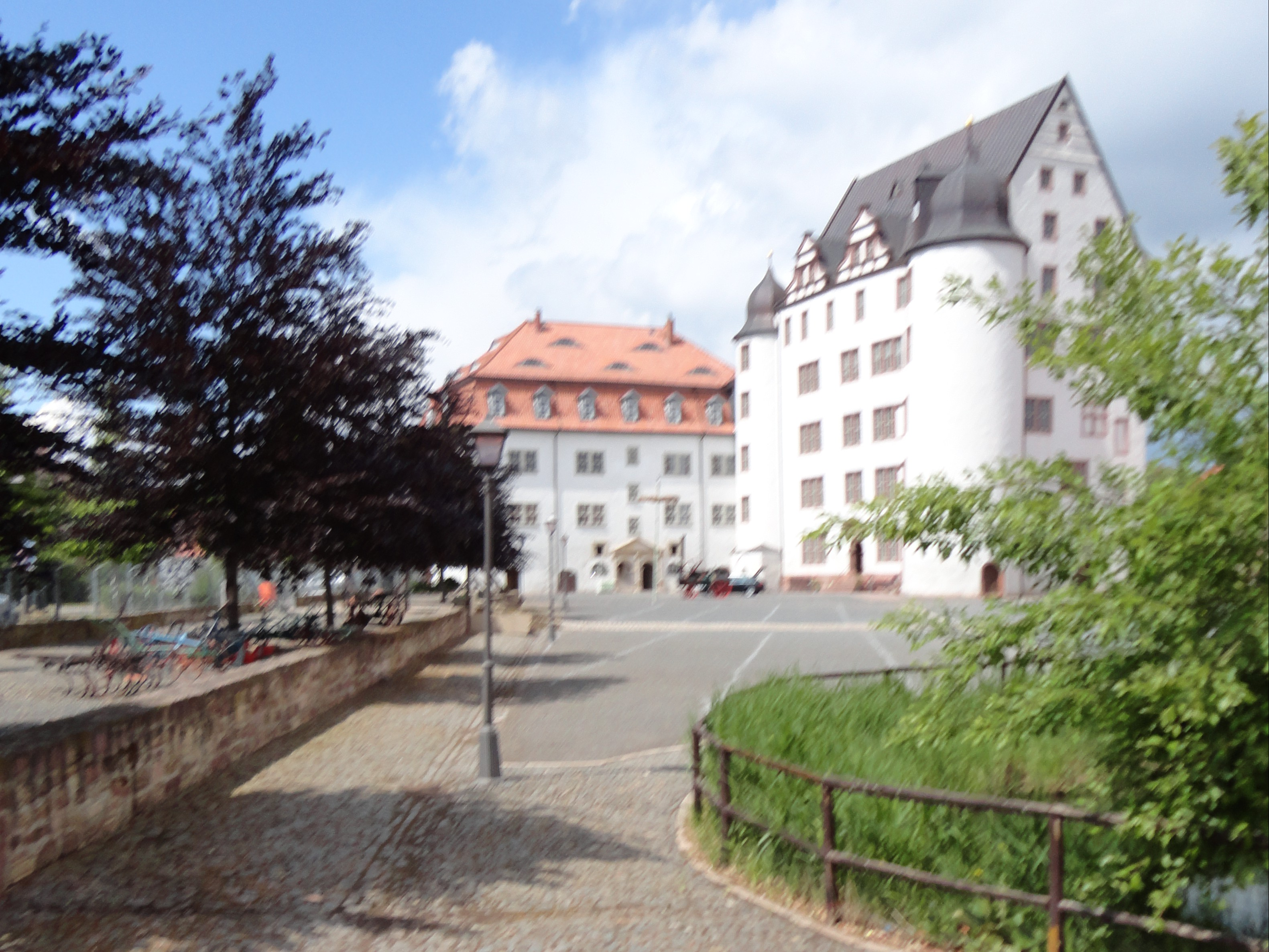 Das neue Schloss (links) und das alte Schloss (rechts) in Heringen/Helme, Mai 2015 vom Herrenhaus aus gesehen. Im alten Schloss wohnten Adelige, im neuen Schloss Amtmänner und im Herrenhaus Amtsverwalter.